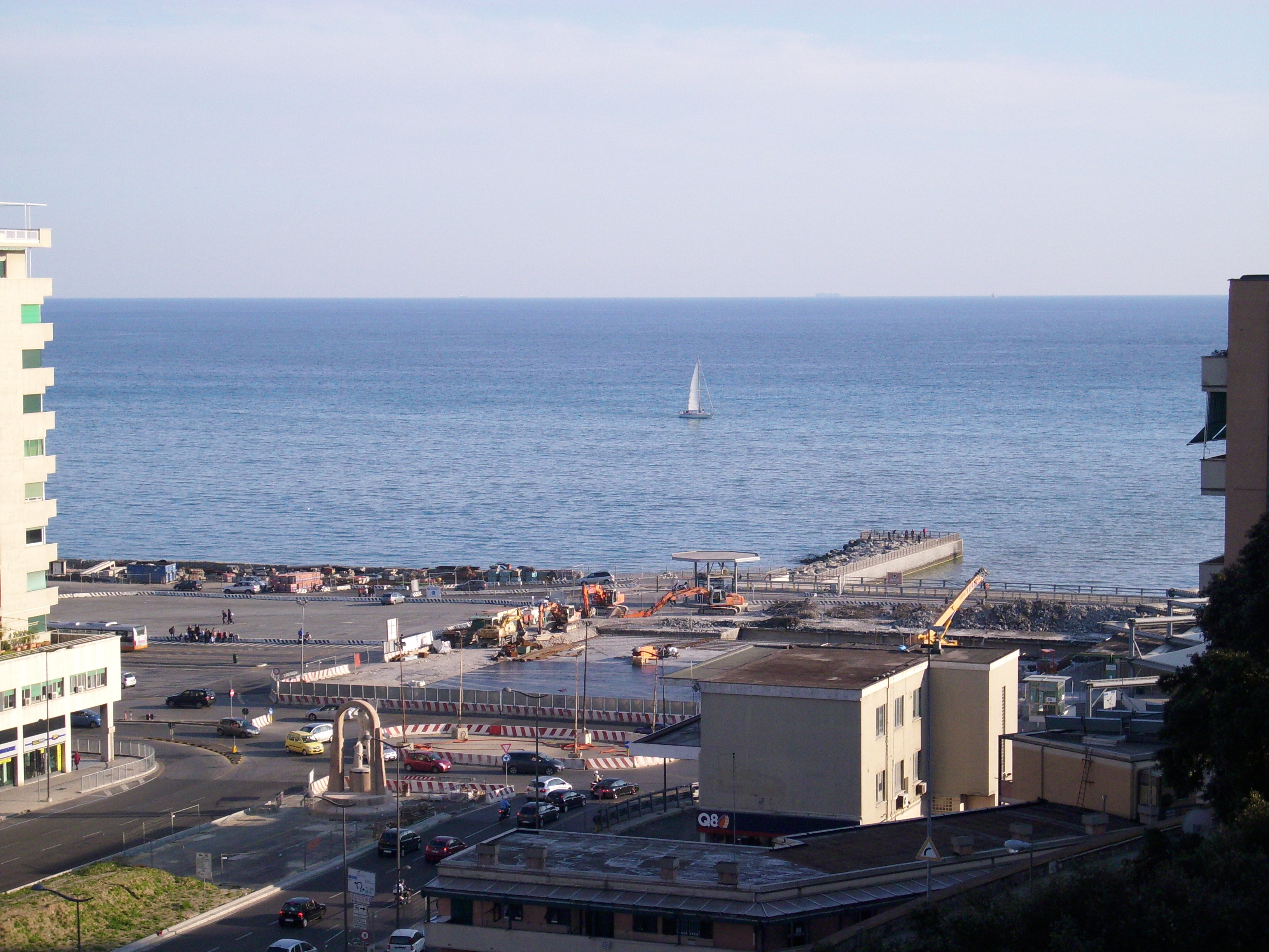 Lavori di rifacimento della copertura della foce del torrente Bisagno, nel quartiere della Foce